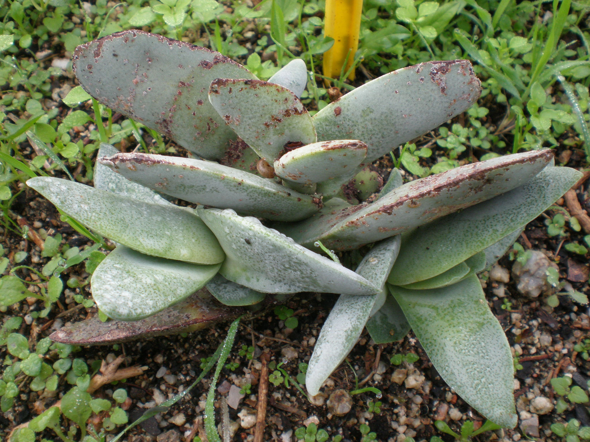 Jardín Botánico de Barcelona.